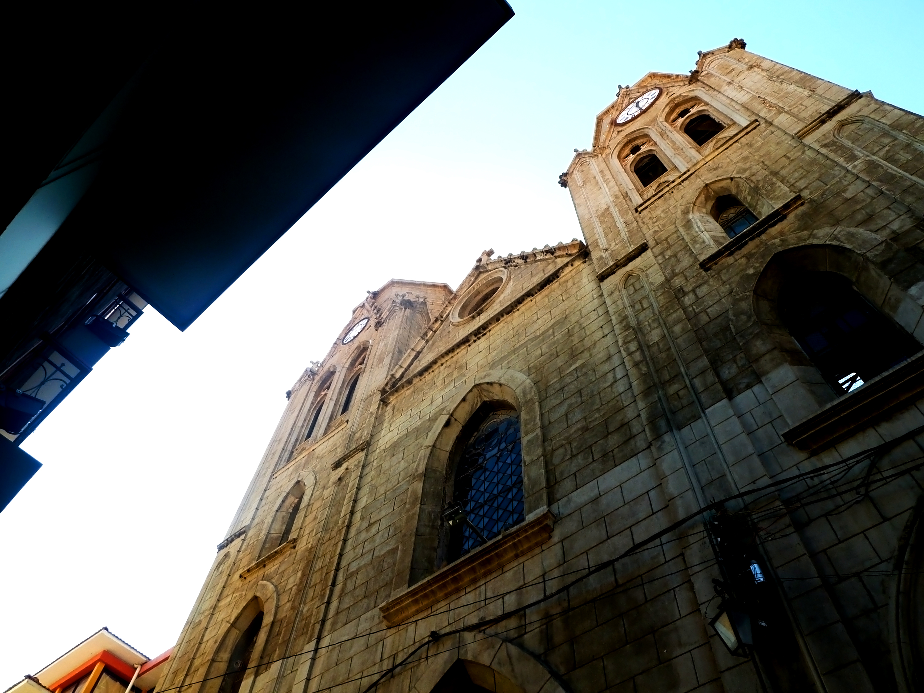 Complejo San Calixto This medium shows the protected monument with the number L/00-041 in Bolivia.